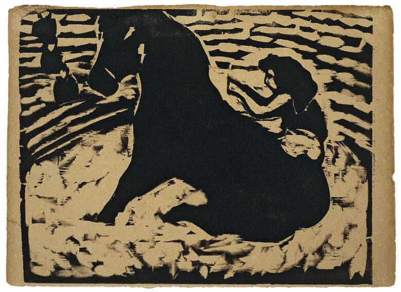 „Zirkusreiterin – Artistin auf schwarzem Pony“. 1909. Holzschnitt auf graubraunem Karton. 37,3 x 48 cm